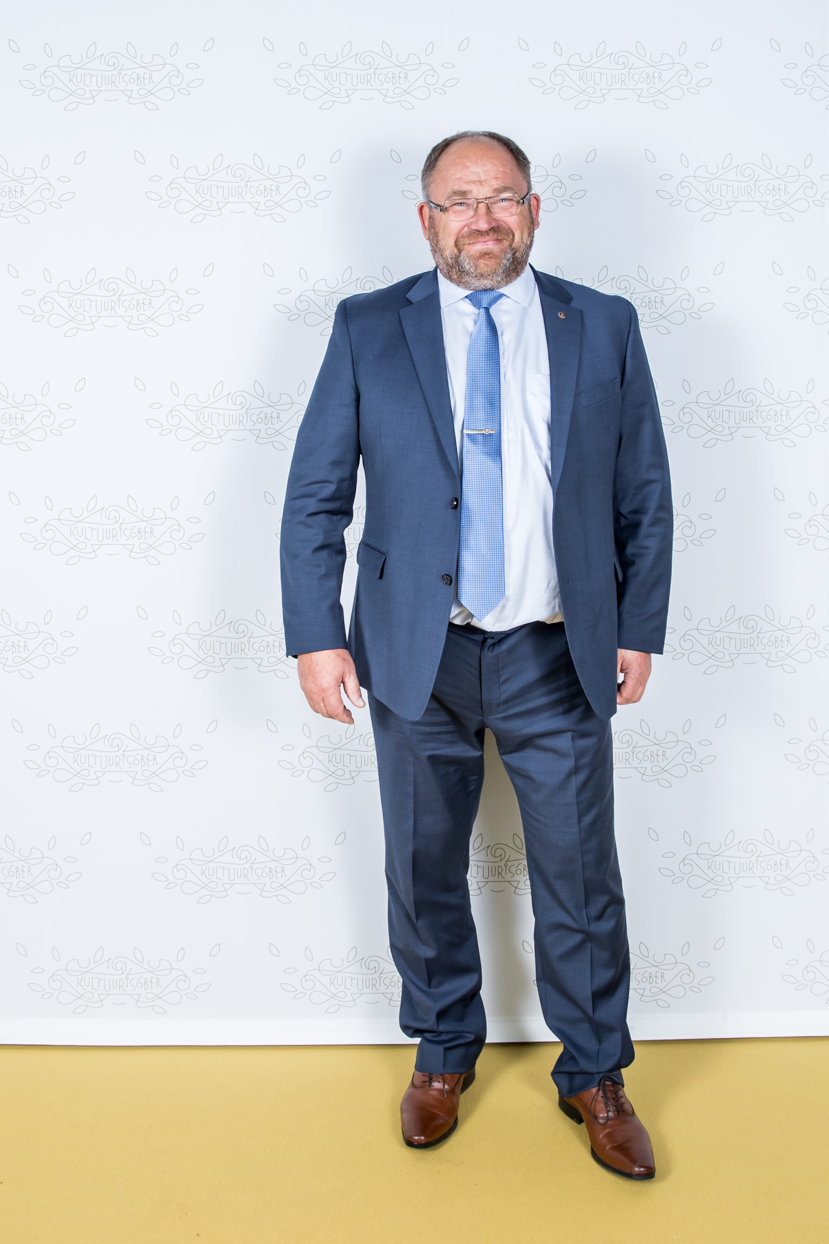 Neinar Seli, Estiko nõukogu esimees